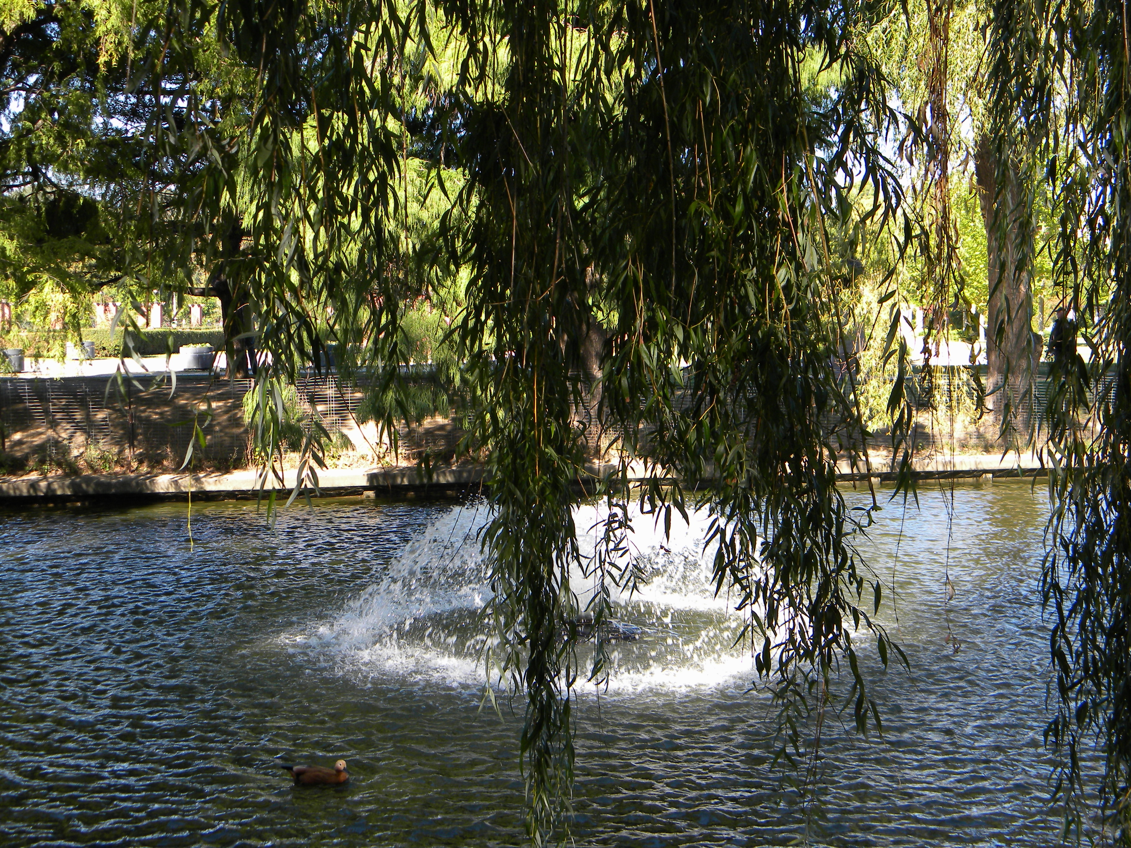 Bucuresti, Romania, Parcul Herastrau (Imagine de pe lacul Herastrau); B-II-a-A-18802 (3)